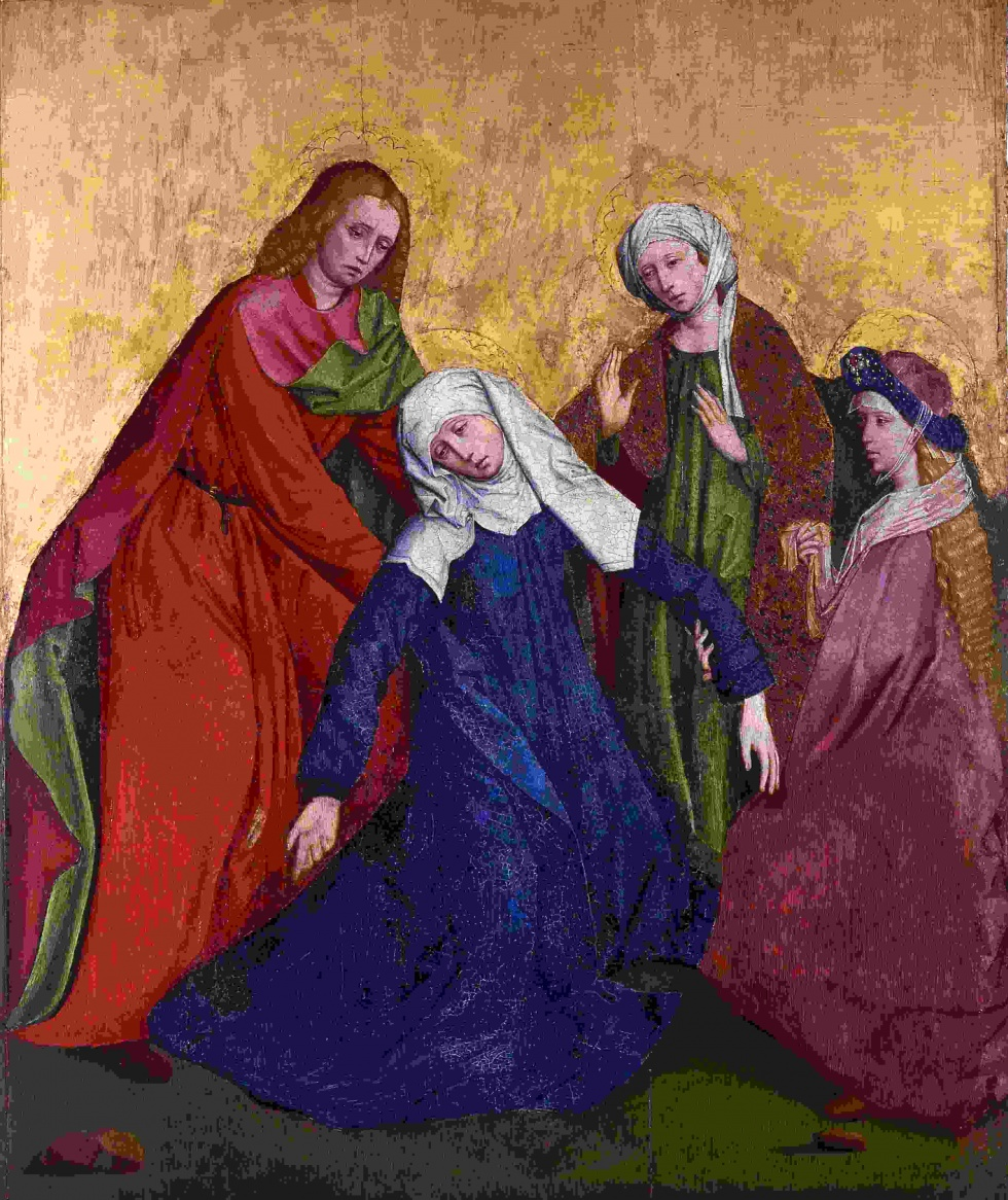 Ohnmacht Mariens; Tempera und Öl auf Holz; 91 x 74 cm; Museum Abtei Liesborn